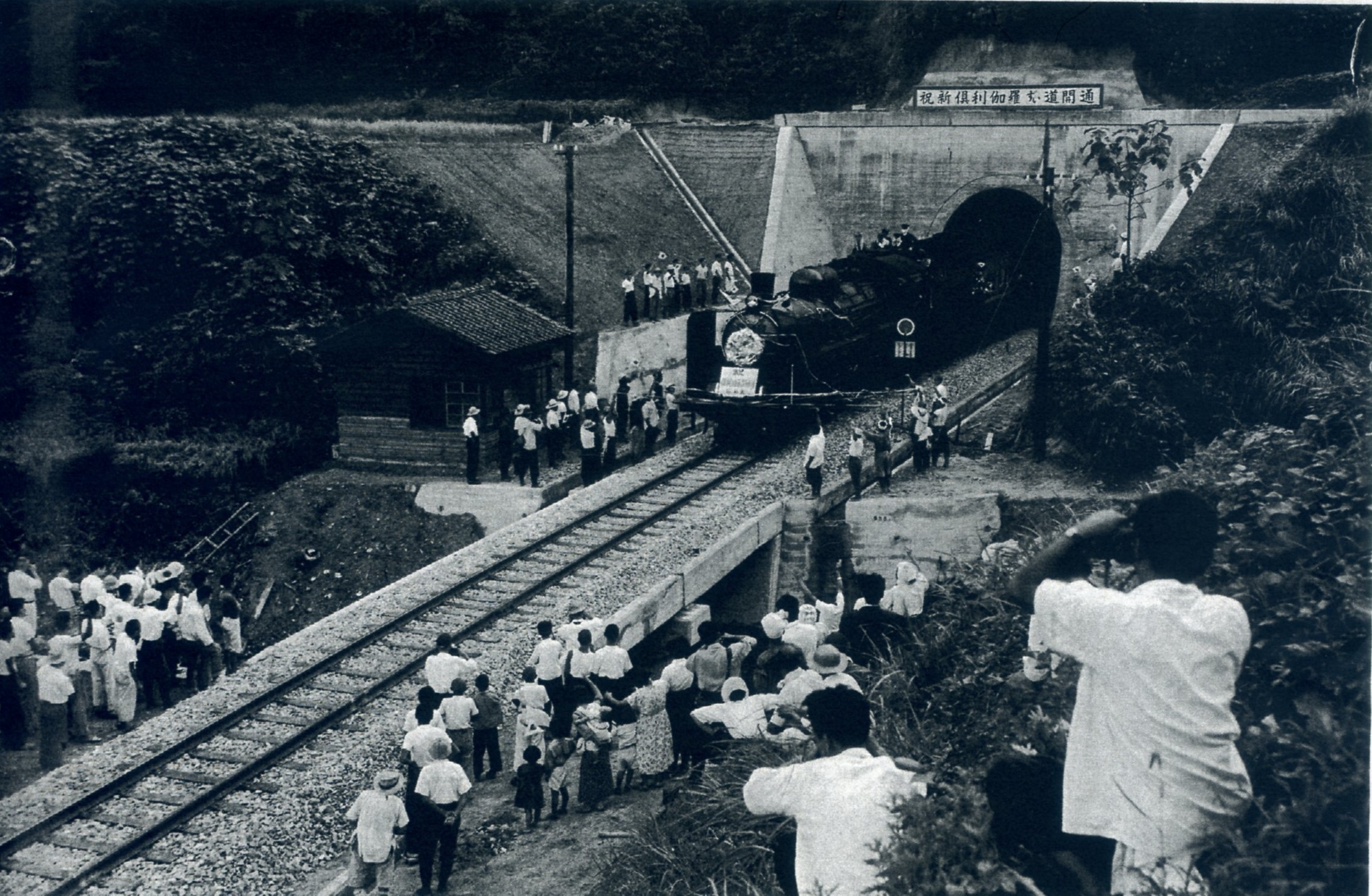 1955年（昭和30年）9月1日北陸本線新倶利伽羅隧道開通